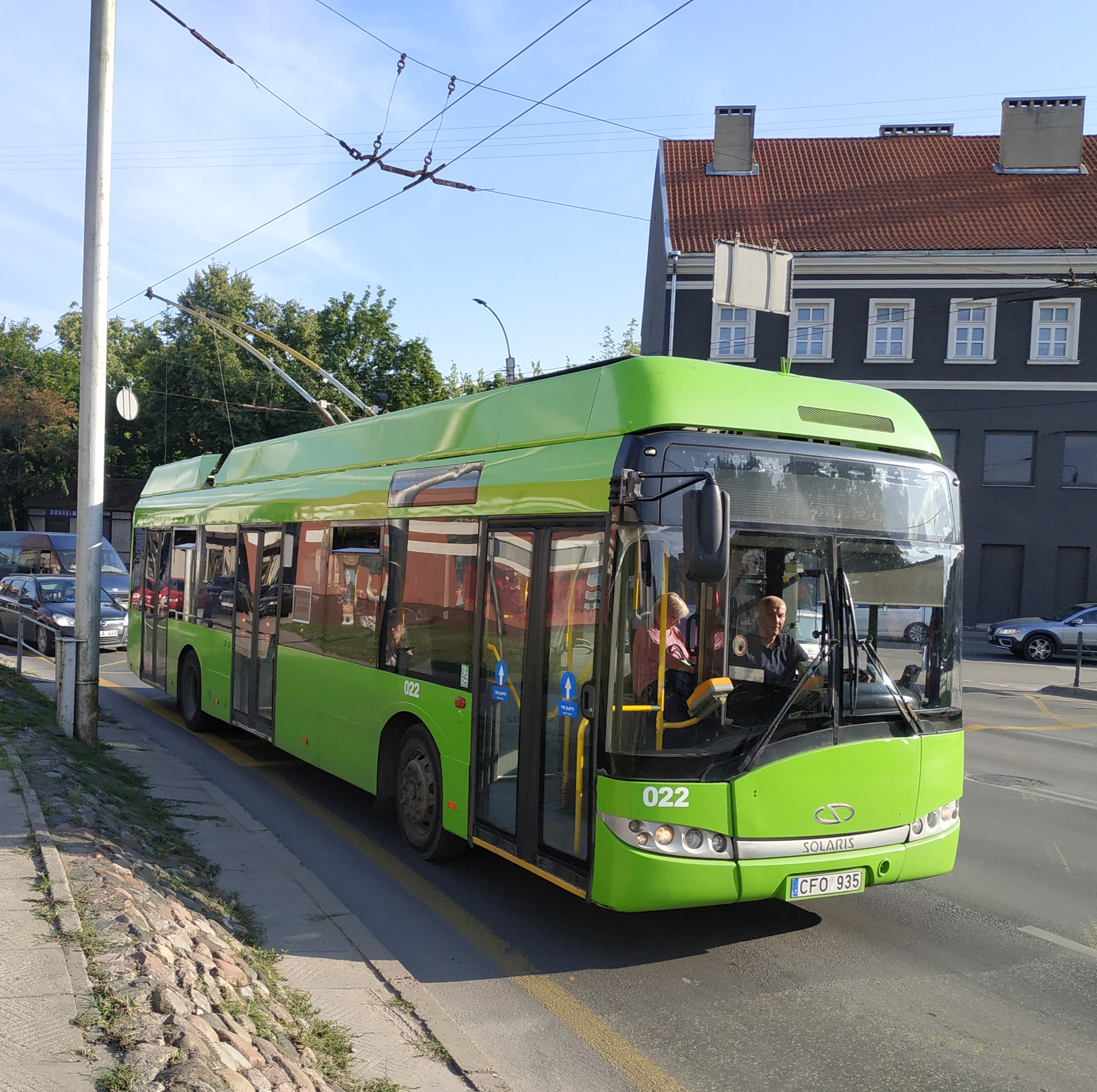 Trolleybus Solaris Trollino 12 circulant à Kaunas